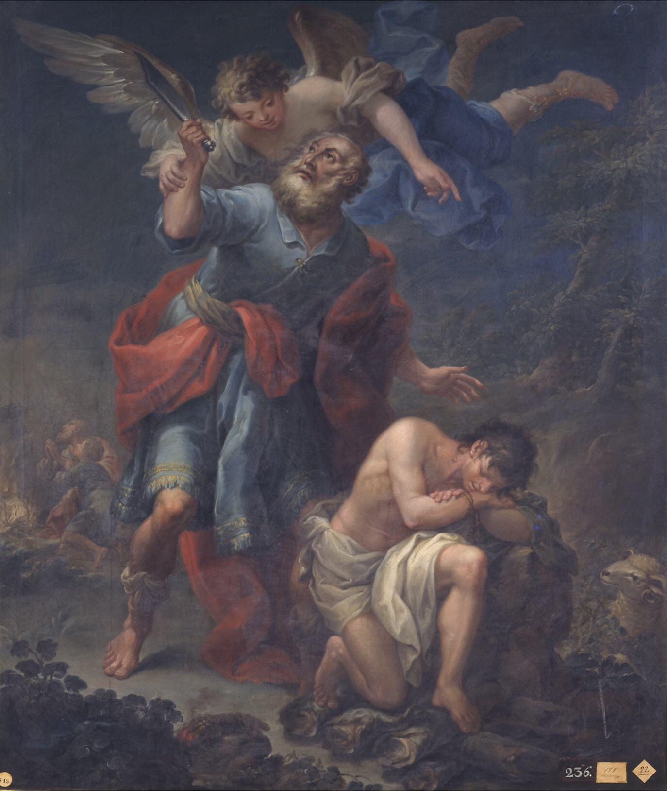 Sacrificio de Isaac. Isidoro de Tapia, pintor (1712 - 1778). Museo de la Real Academia de Bellas Artes de San Fernando, Madrid.